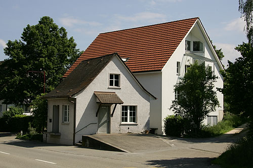 Wahlen